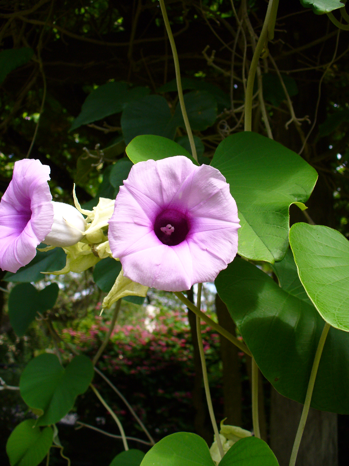 Argyreia nervosa in Fairchild Tropical Botanic Garden, Miami, Florida, USA.